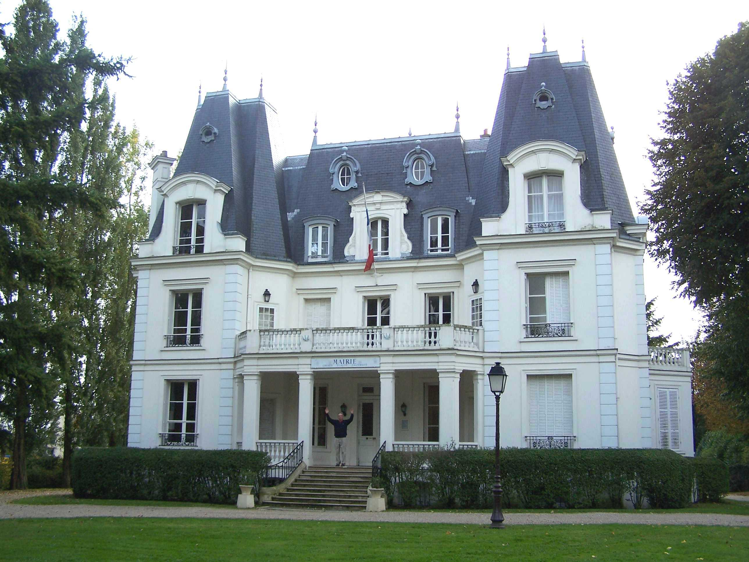 Mairie de Bailly (Yvelines, France)